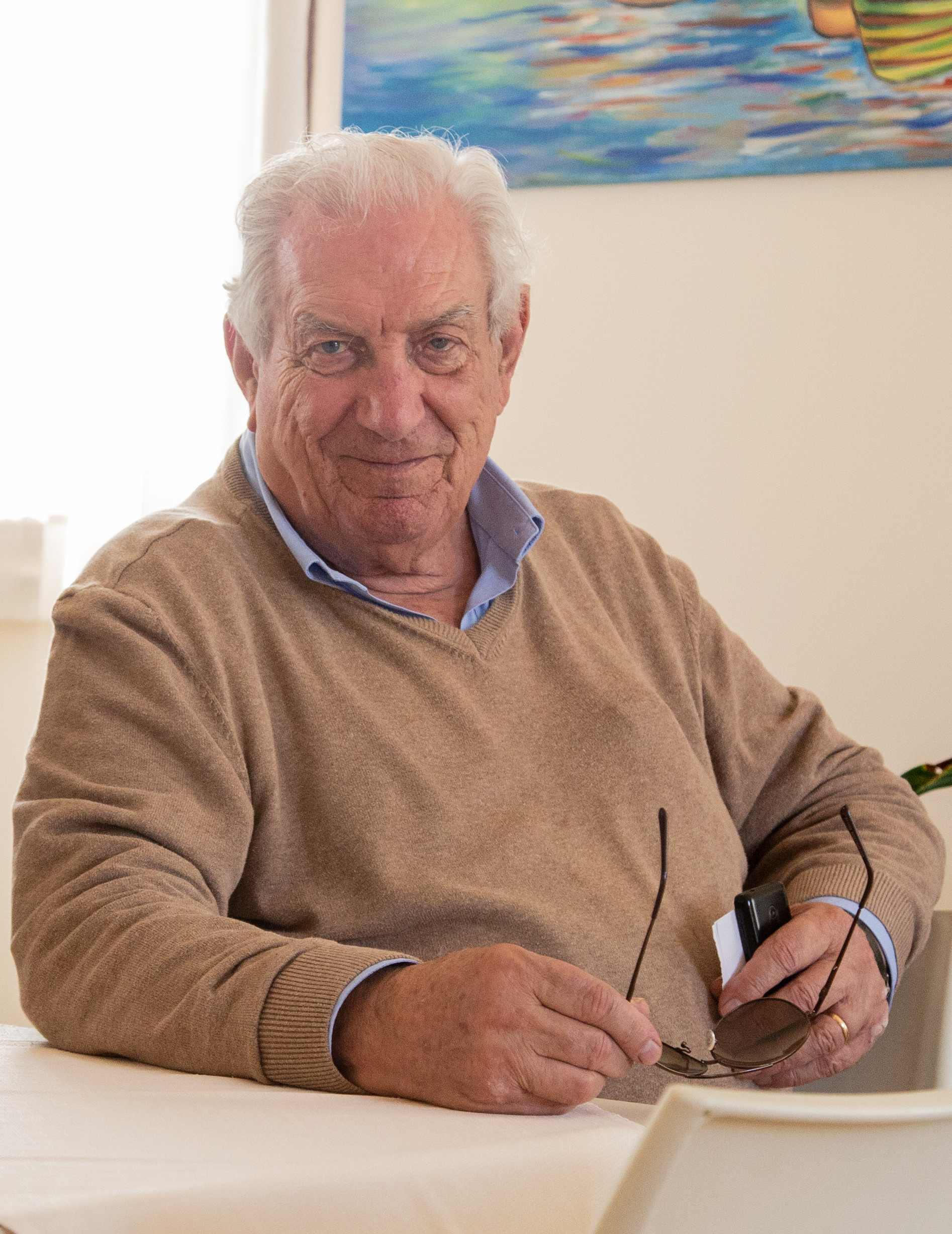 Primo piano dell'Ing. Francesco Lo Trovato